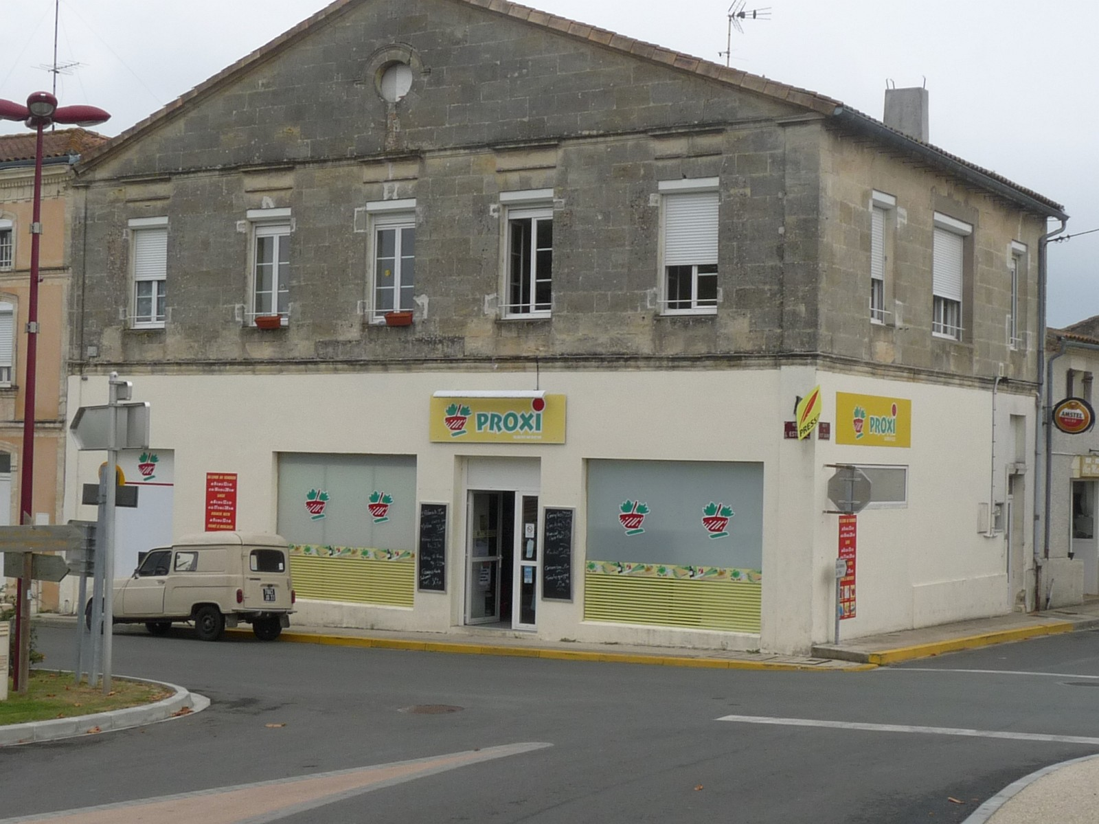 Commerce de proximité, Anglade,Gironde, France